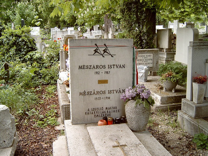 Mészáros István (1933-1994) kajak világbajnok. Mészáros Györggyel, ikertestvérével 1954-ben Maconban K-2 1000 méteren világbajnokok voltak. Farkasréti temető: 25/1-3-3